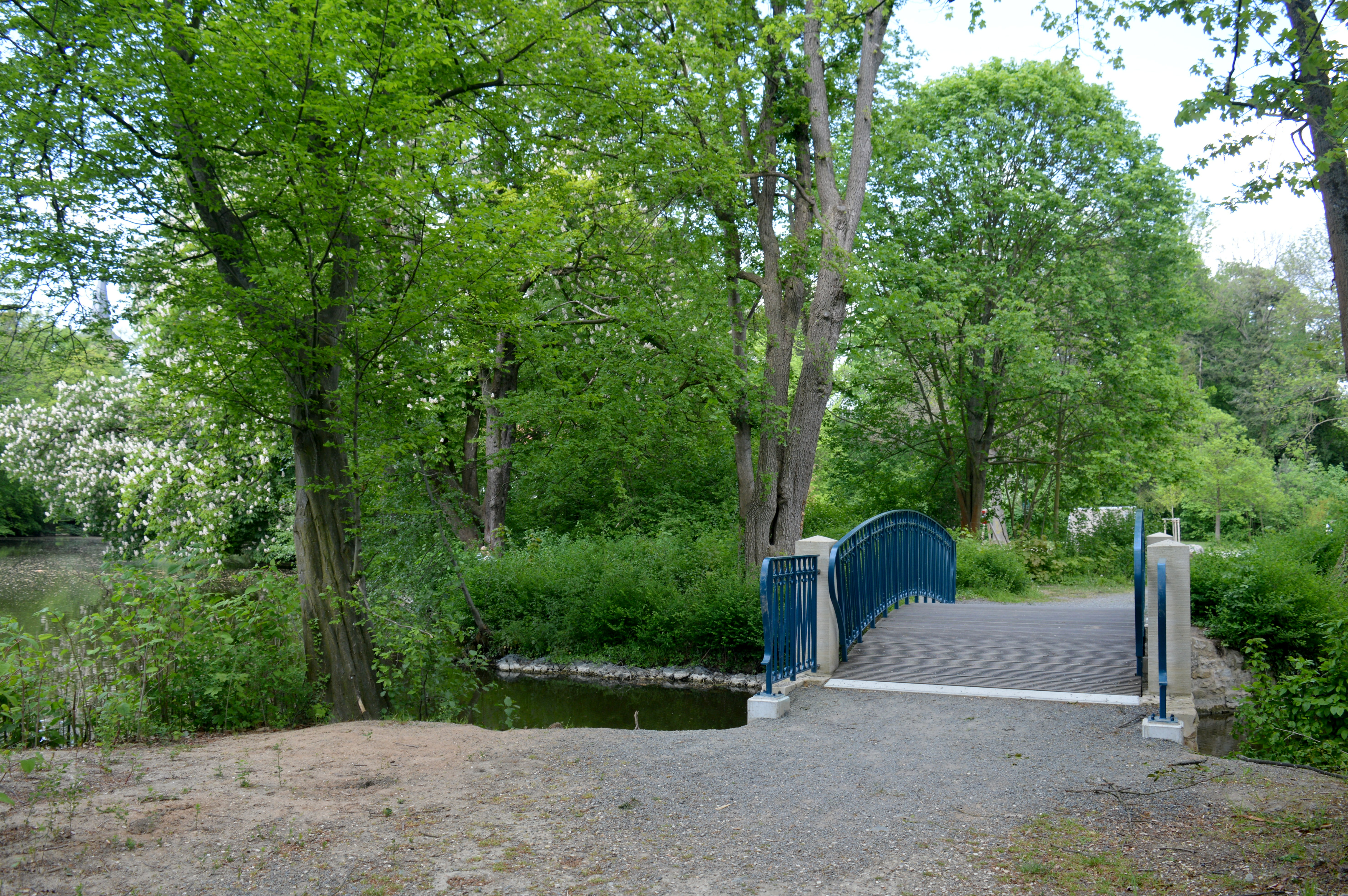 Landschaftsschutzgebiet Wallanlagen - Ernst-Ehrlicher-Park (6)